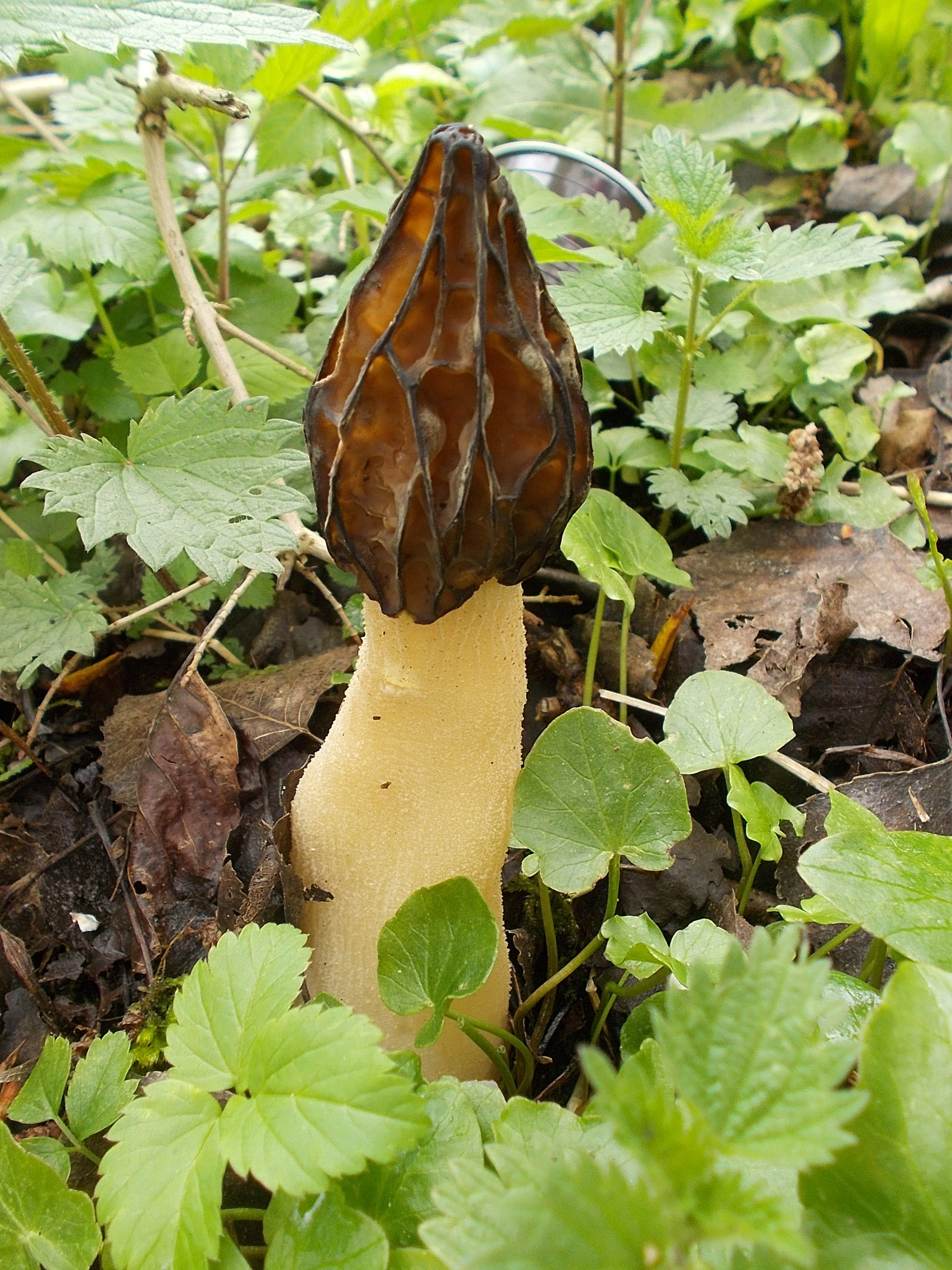 Kapjesmorielje (Morchella semilibera) gevonden bij de Douwelerkolk te Deventer